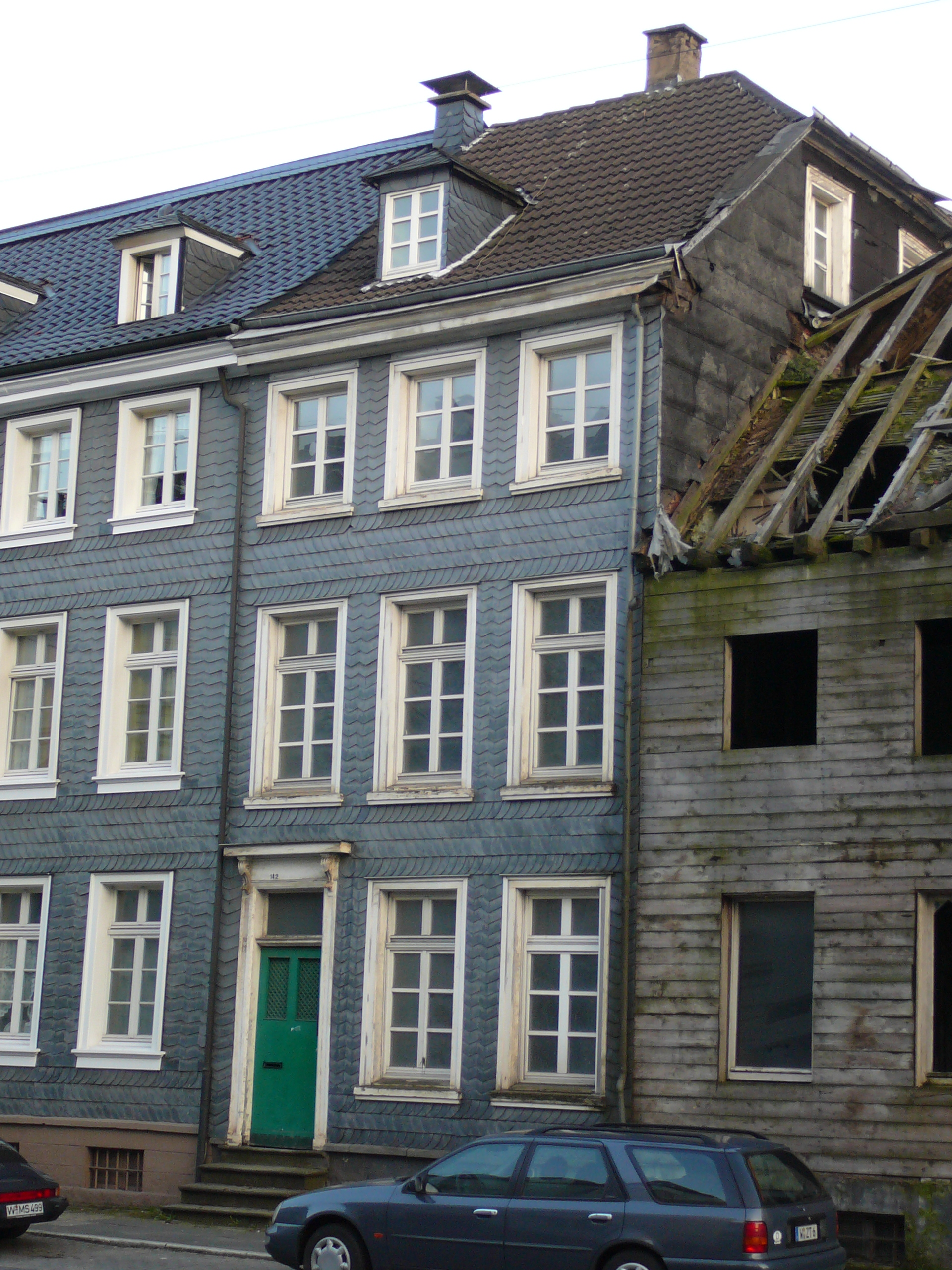 Friedrich-Engels-Allee, Wuppertal